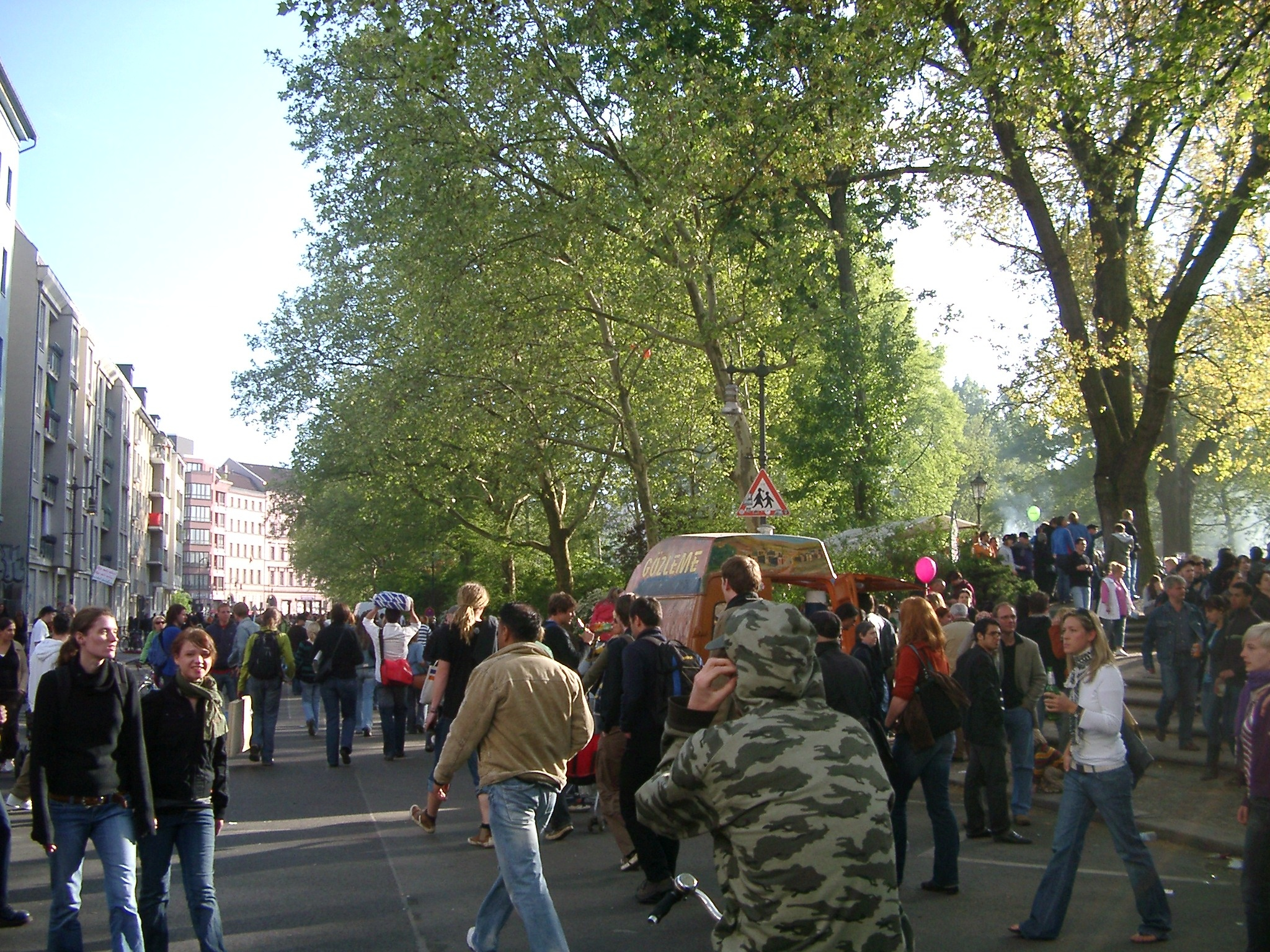 Festival Mariannenplatz in Berlin-Kreuzberg on Mayday 2007